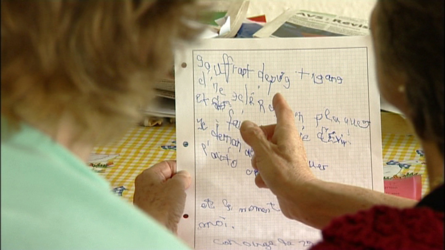 L’accompagnatrice Marianne aide Jocelyne à lire. Image tirée du film « EXIT, le droit de mourir » de Fernand Melgar.